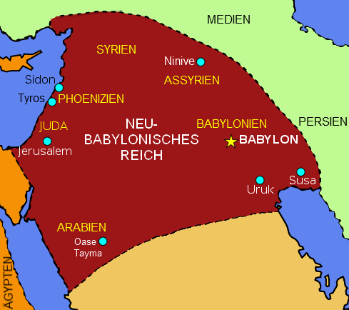 Karte des Neu-Babylonischen Imperium um 540 v.Chr.